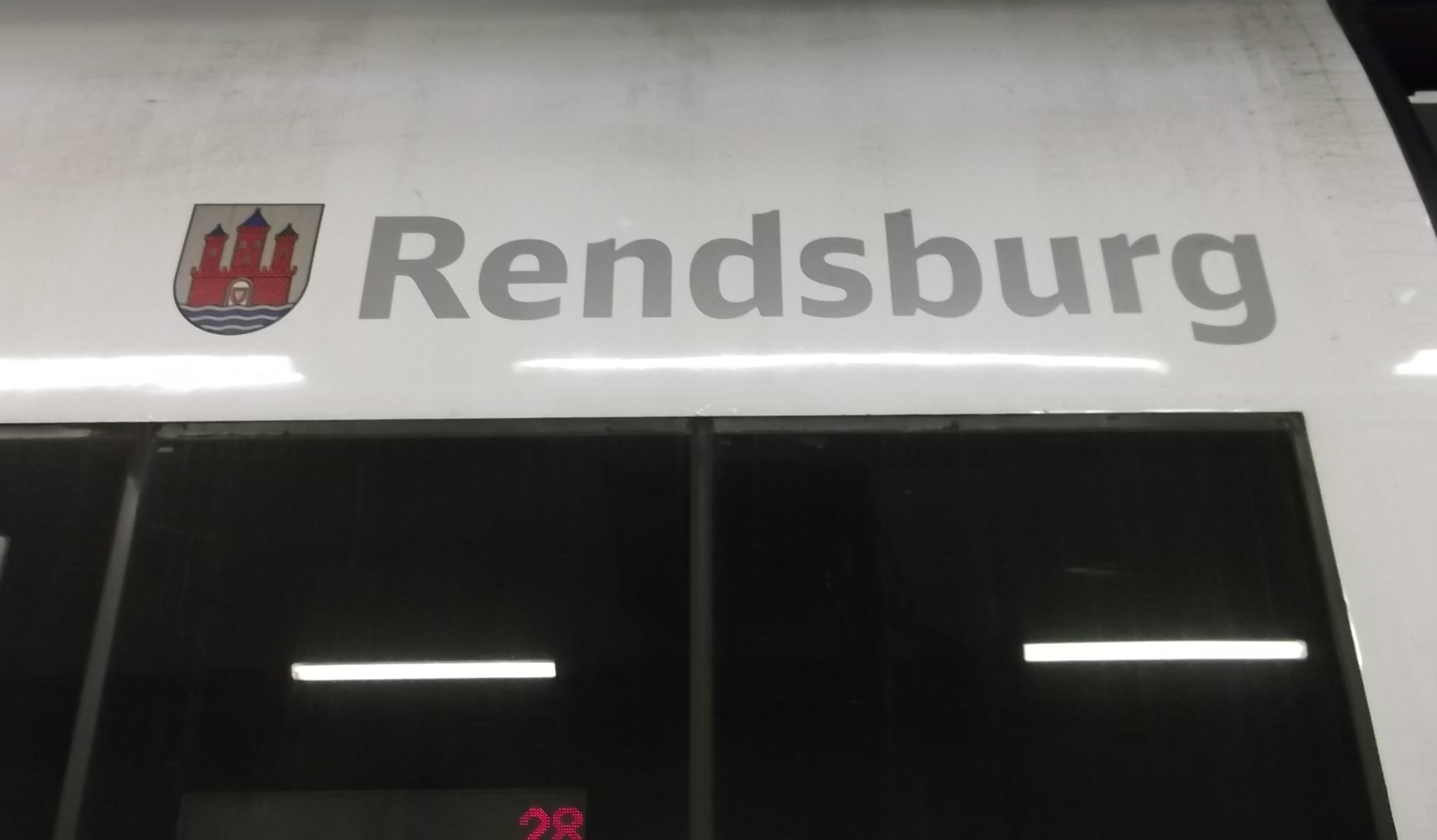 Rendsburg - Namensgebung des Inter City Express Triebzuges 5520